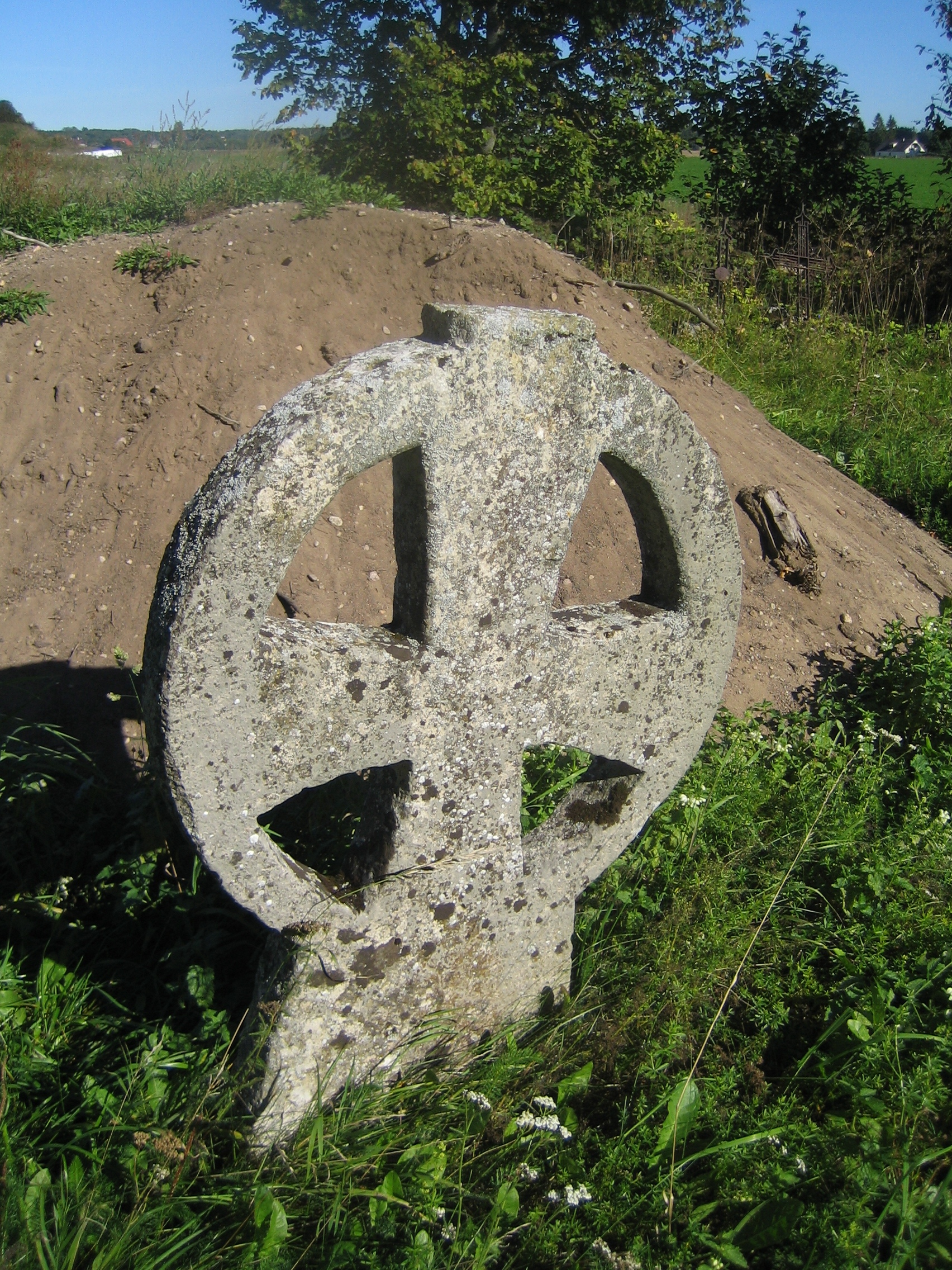 Saha kabeliaed, 15.saj.